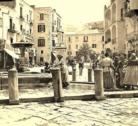 Pozzuoli, la piazza. Autore sconosciuto.